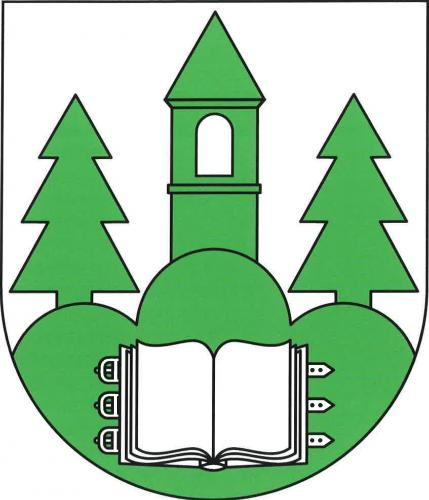 Znak obce Smrček